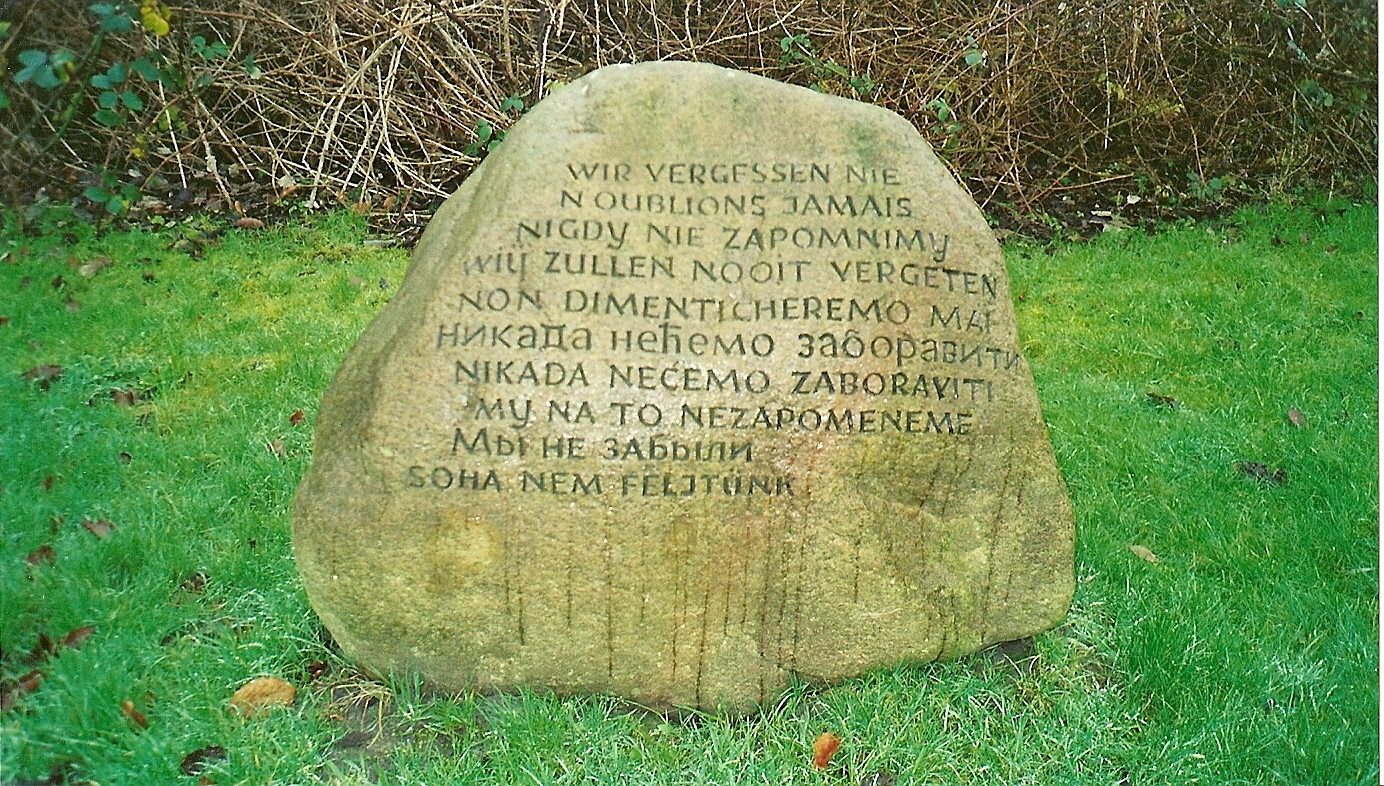 Title Gedenkstein auf dem Gelände des ehemaligen KZ Wilhelmshaven Wilhelmshaven Concentration Camp Memorial Stone